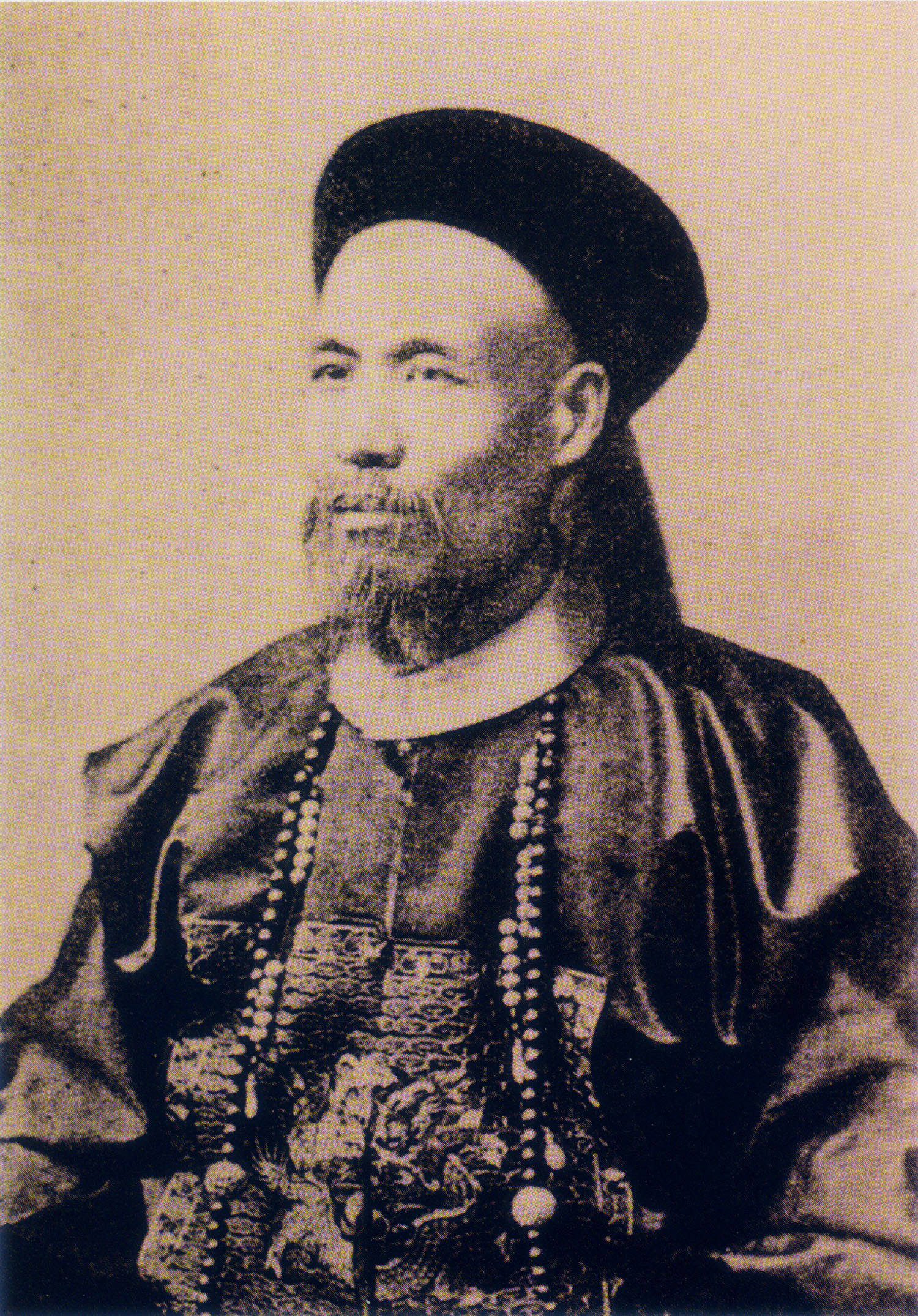 曾纪泽的照片，其人1890年去世。